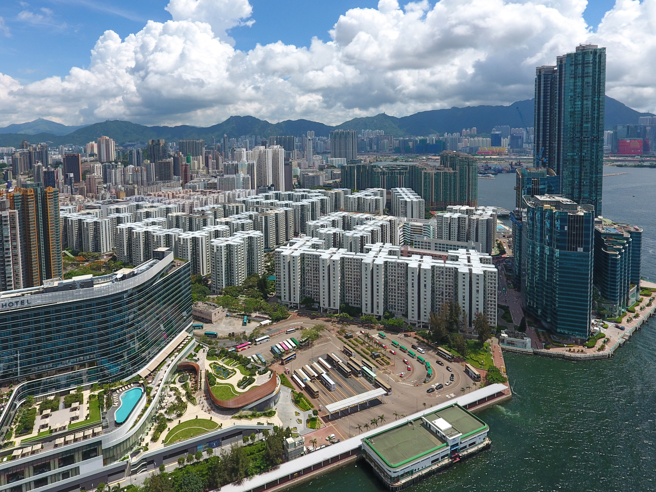 Whampoa Garden